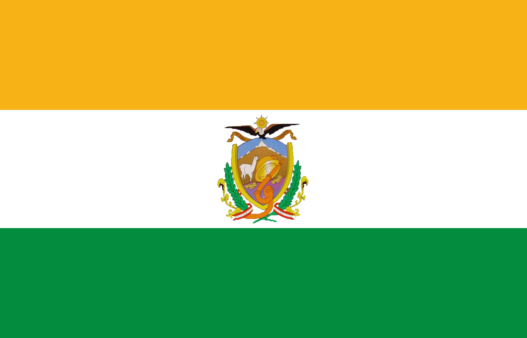 Runa Simi: uj allin unancha Ananiya llajtapi Aymar aru: maa wali wiphala Ananiyaxa